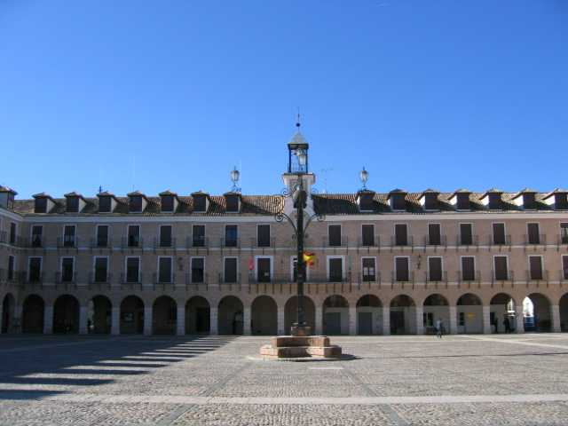 Plaza mayor de Ocaña